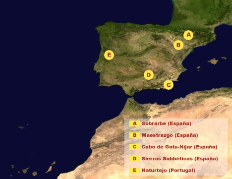 Geoparques en España y Portugal. Imagen derivada de Image:European Geoparks map.jpg siguiendo las condiciones de la licencia original.